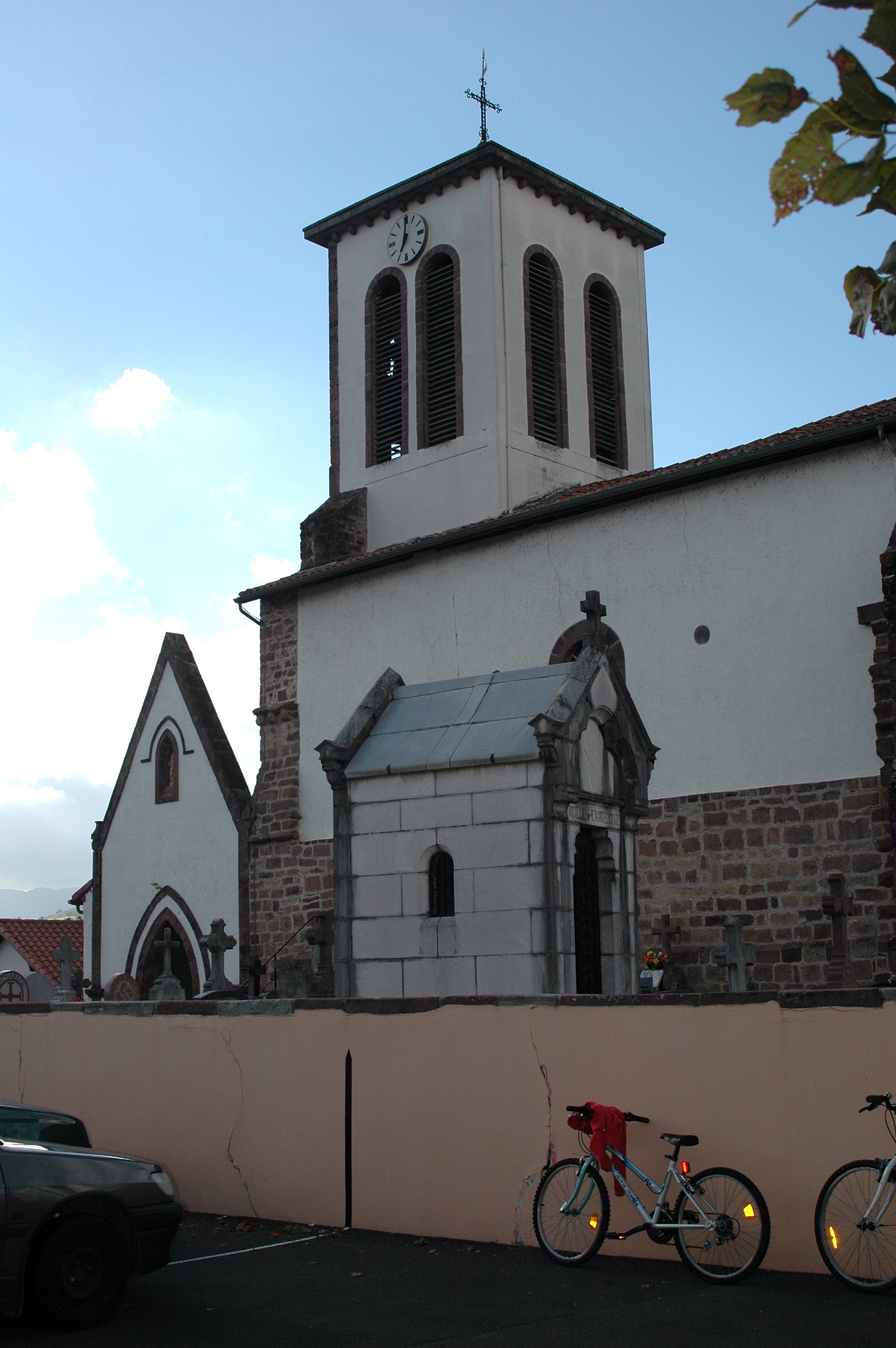 Uhart-Cize, l'église Saint-Martin. Photo prise le 03/08/06 par Harrieta171